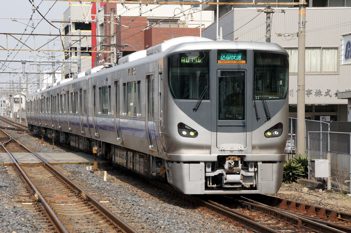 JR西日本225系（阪和線）